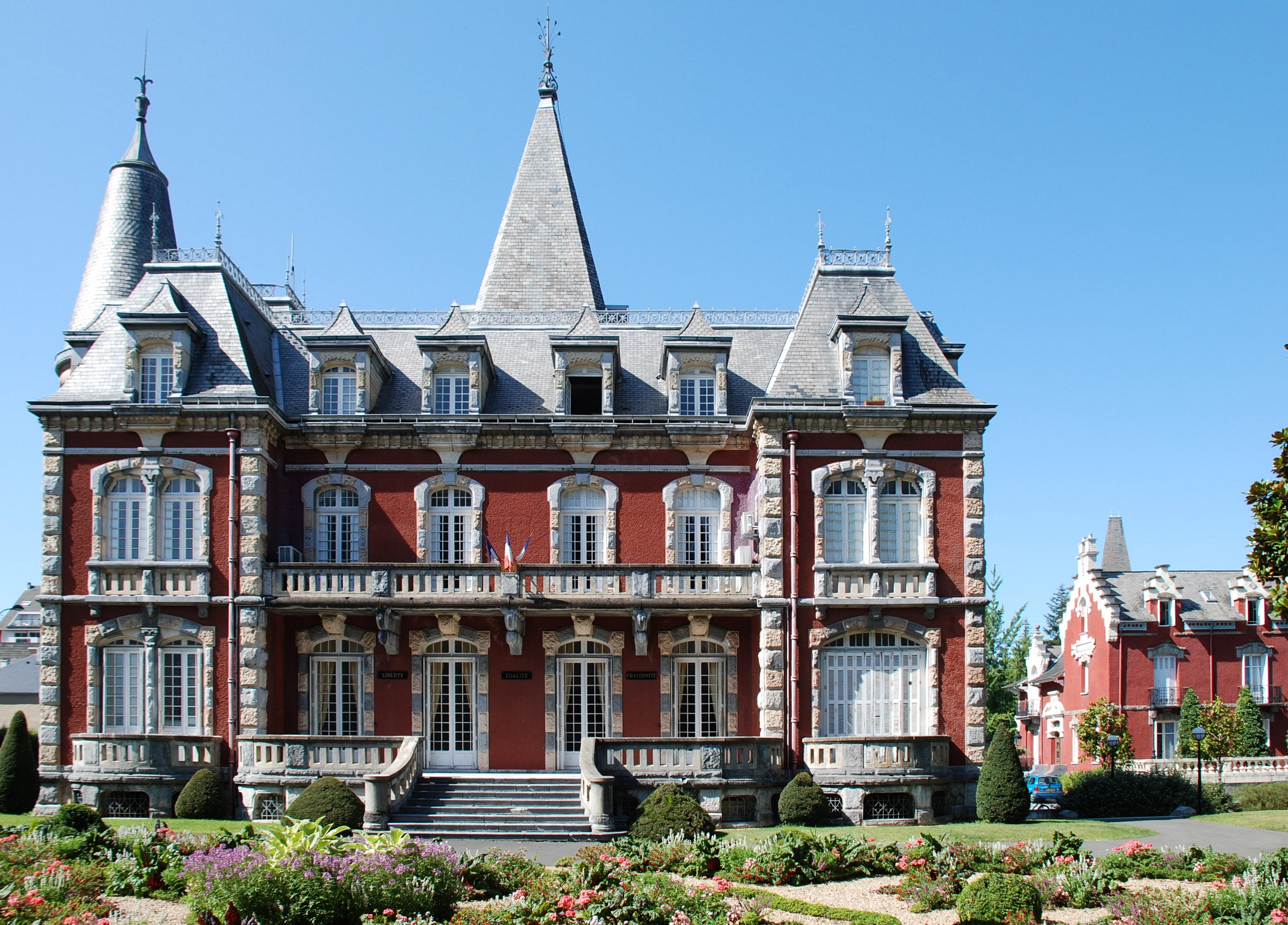 Mairie de Lourdes, façade sud, côté jardin, bâtiment des services techniques au fond